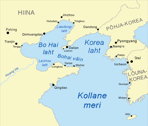 Bo Hai